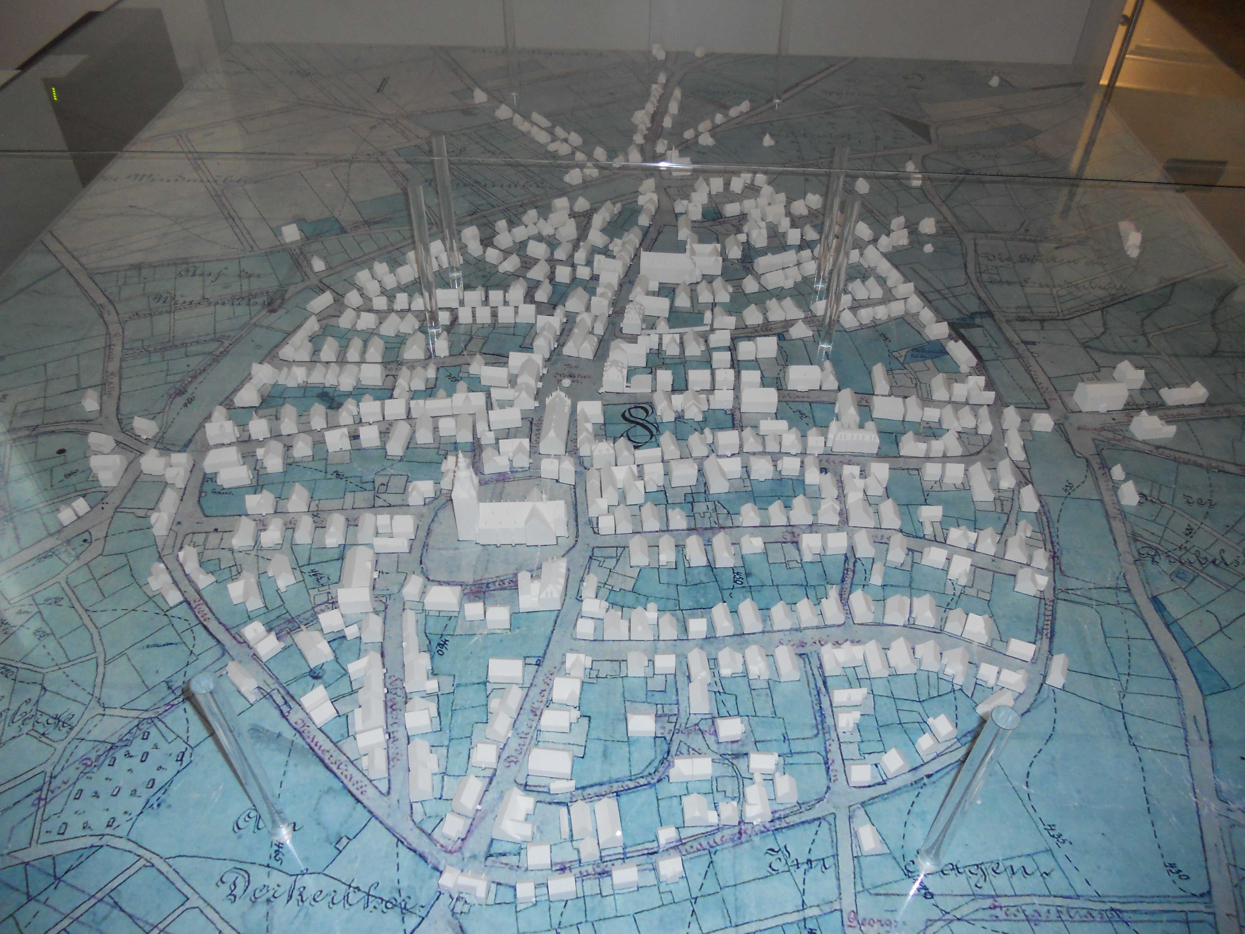 Interaktives Stadtmodell im Museum Haus Hövener